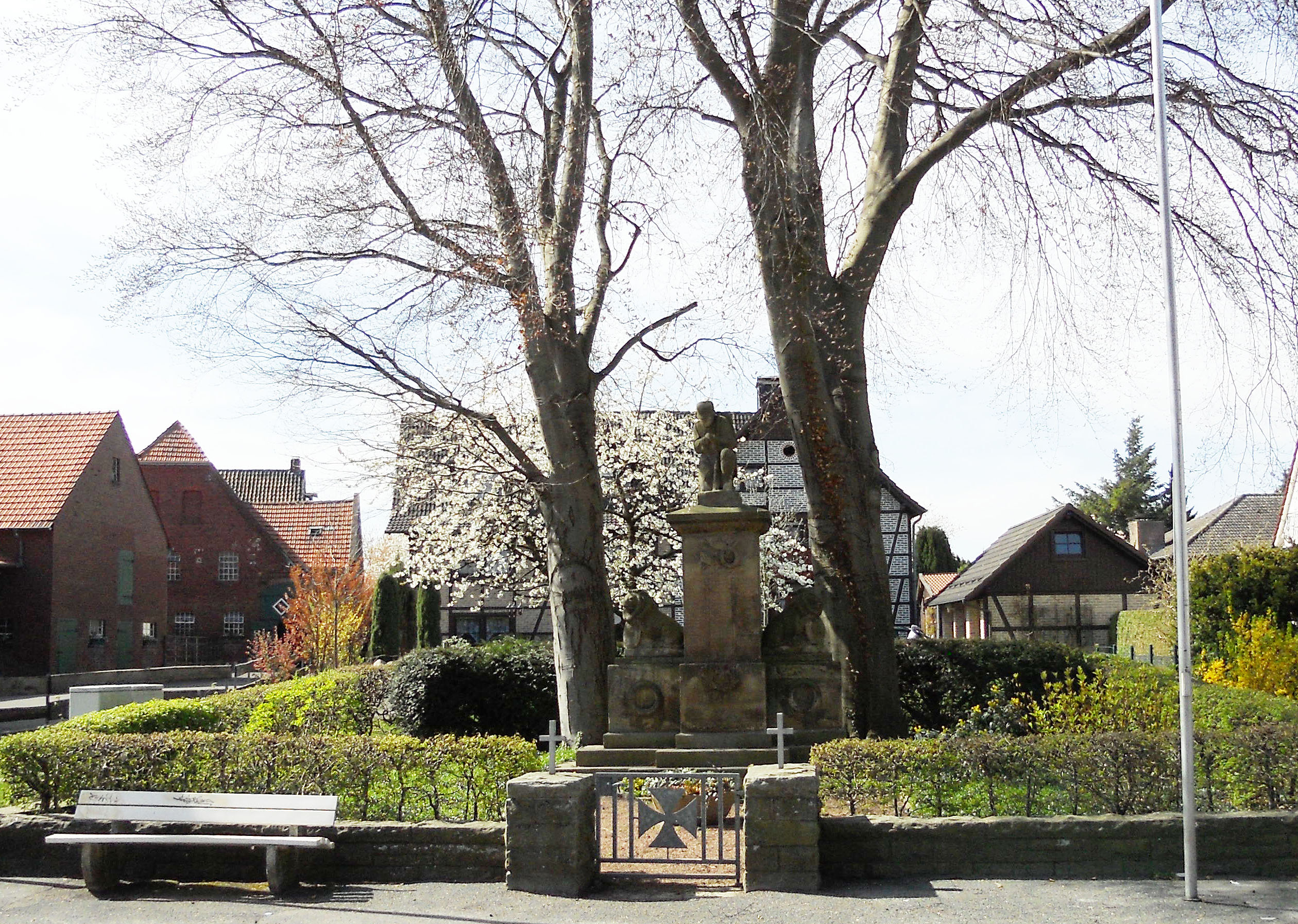 Kriegerdenkmal in Sönnern in der Antoniusstraße gegenüber der Kirche